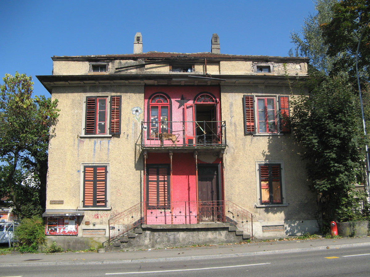 Das alternative Kulturzentrum Bremgarten (KuZeB)